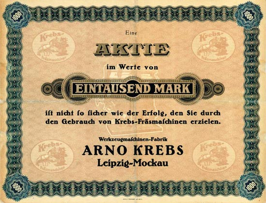 Aktienimitat zu Werbezwecken um 1910